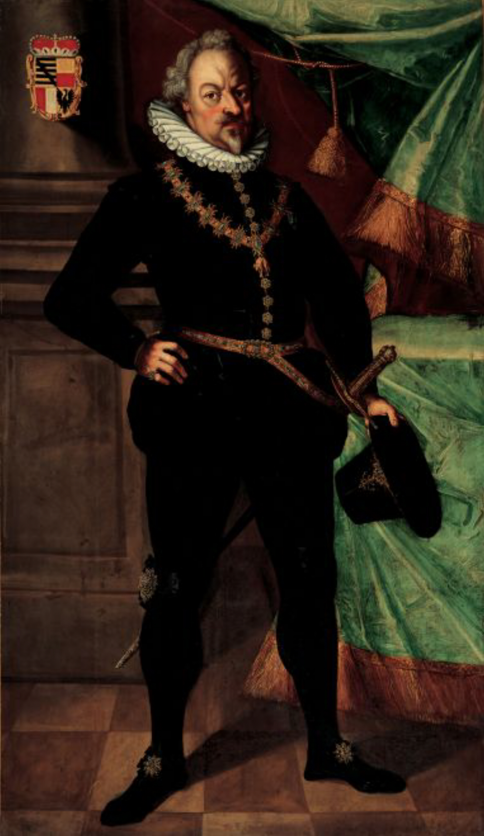 Karl I, prince of Liechtenstein (1569-1627)